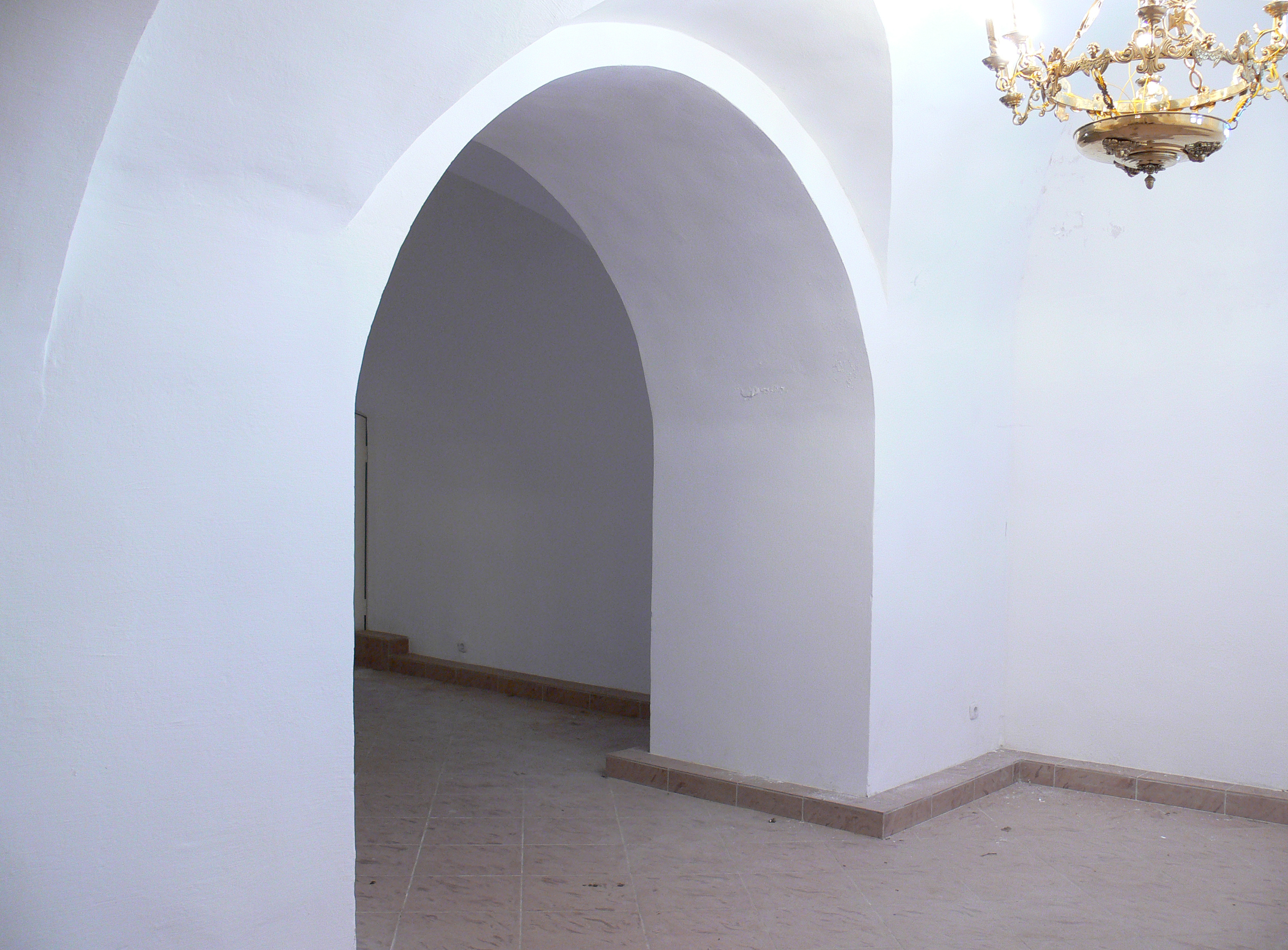 Церковь Похвалы Пресвятой Богородицы Юрьева монастыря. Великий Новгород